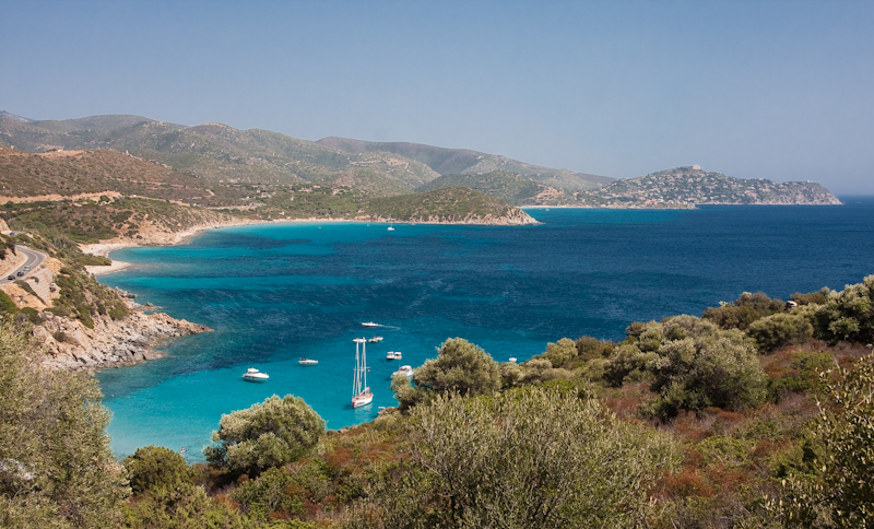 Spiagga Genn'e Mari , Maracalagonis (Torre delle Stelle) , CA